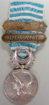 Médaille commémorative de Syrie-Cilicie